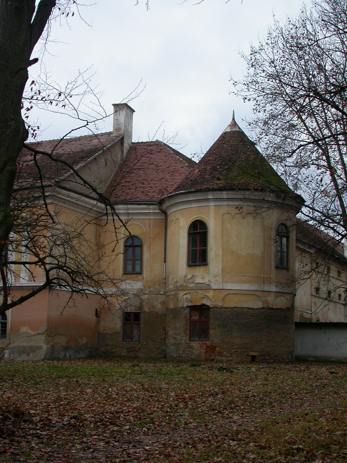 Castelul Wass -Banffy, sec. XV - XIX